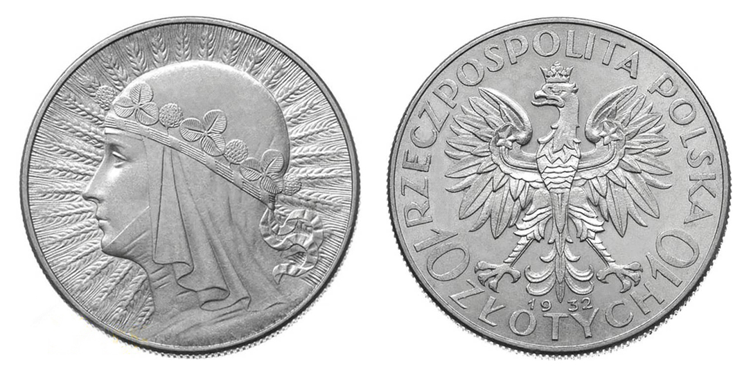 Polonia (1932);autor projektu: Antoni Madeyski (1862-1939)